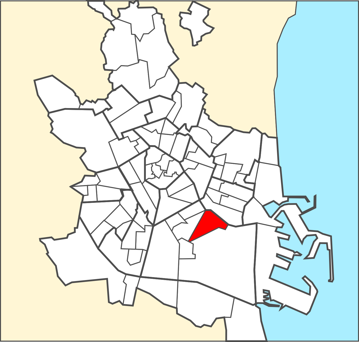 Localització del barri dins de la ciutat de València.